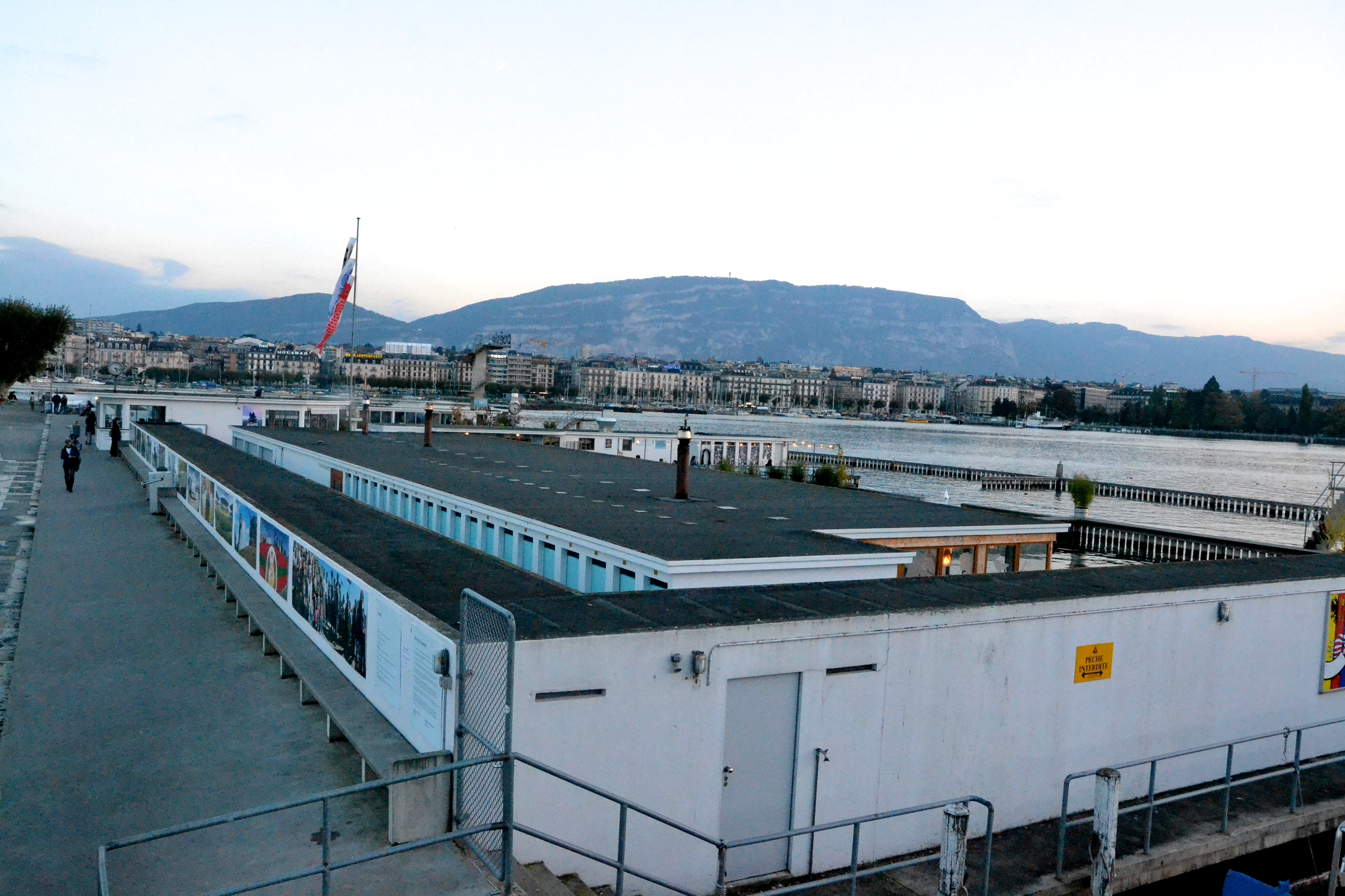 Les bains des Pâquis en soirée.